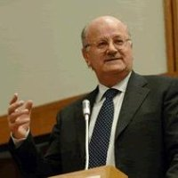 Elio Catania, presidente